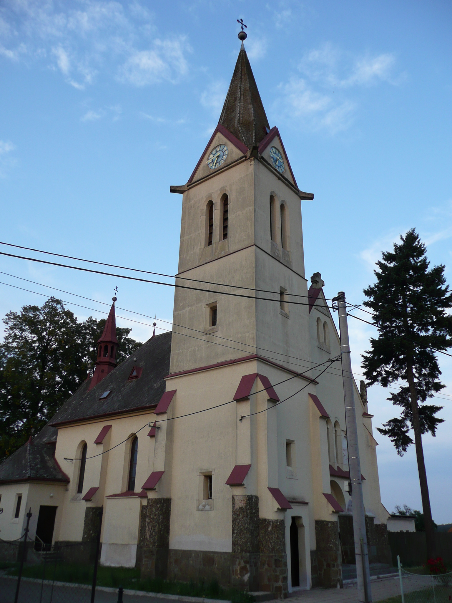 Kostel sv.Cyrila a Metoděje v Podivicích(okr.Vyškov) postaven roku 1911